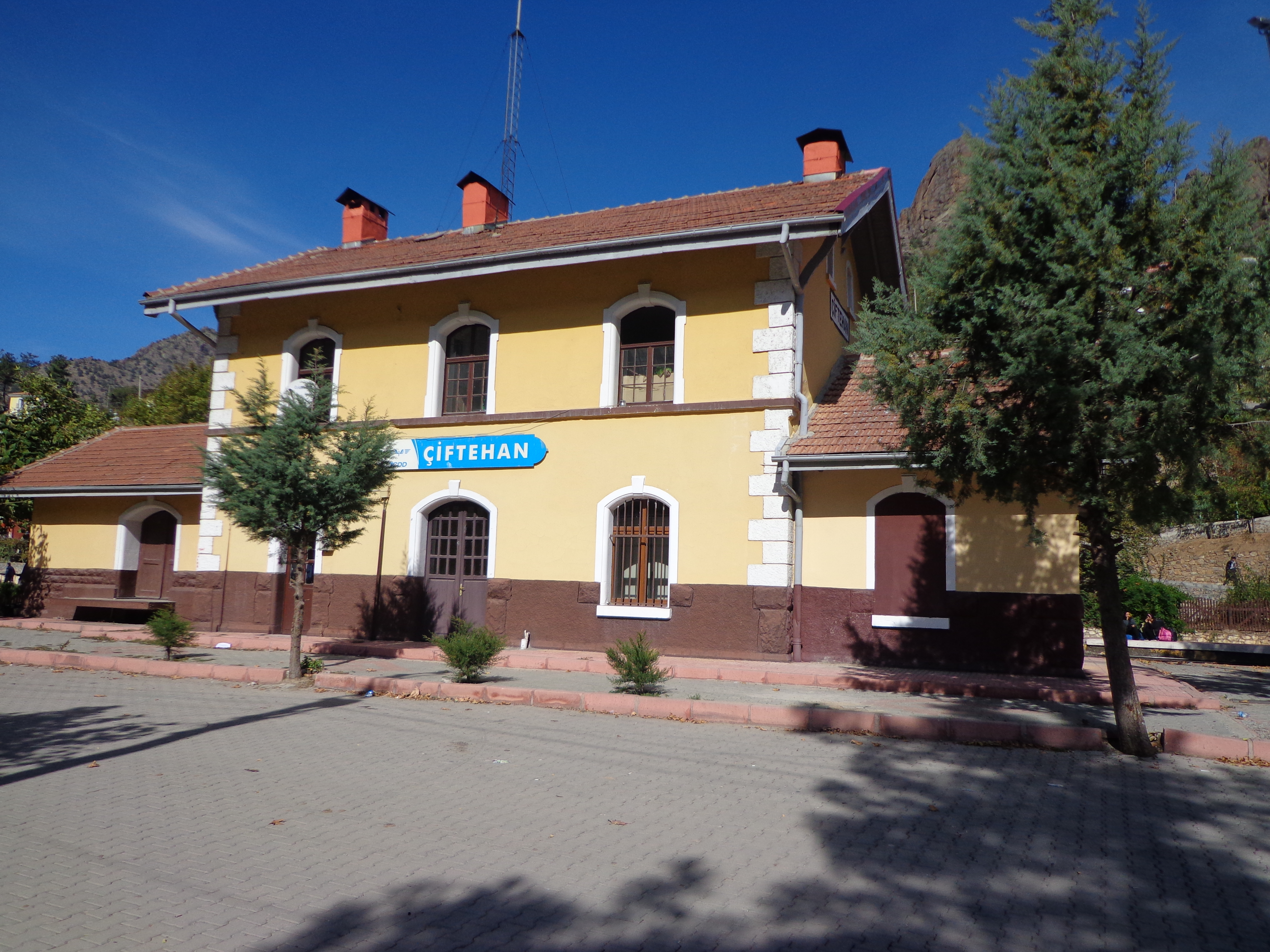 niğde çiftehan UFUK MERAL